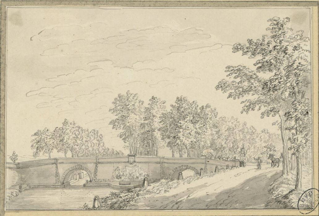 Jonction du Canal du Midi ou de Languedoc, et du Canal de Brienne à 1/4 de lieue au nord de Toulouse (21 aout 1818). URL : Droit : Bibliothèque municipale de Toulouse - domaine public.